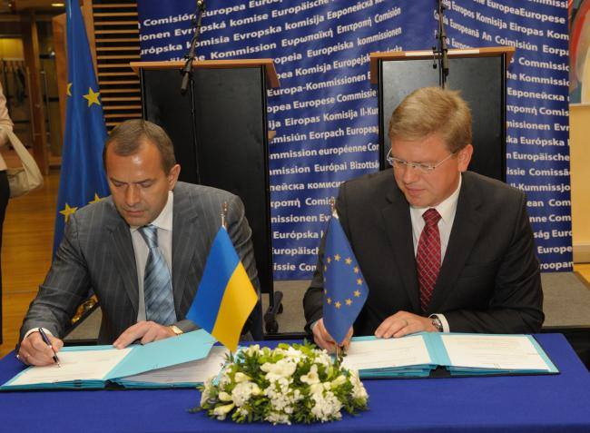 Перший віце-прем’єр-міністр – Міністр економічного розвитку і торгівлі України Андрій Клюєв та Комісар ЄС з питань розширення та Європейської політики сусідства Штефан Фюле підписали у вівторок в Брюсселі Угоду між Урядом України та Європейською Комісією про фінансування проекту «Місцевий розвиток, орієнтований на громаду – етап ІІ».